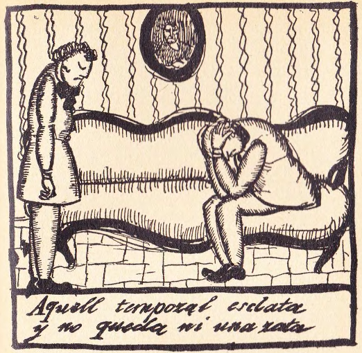 Homes decebuts. Imatge de la pàgina 253 de L'auca del senyor Esteve (ed. 1912): Aquell temporal esclata y no queda ni una rata.